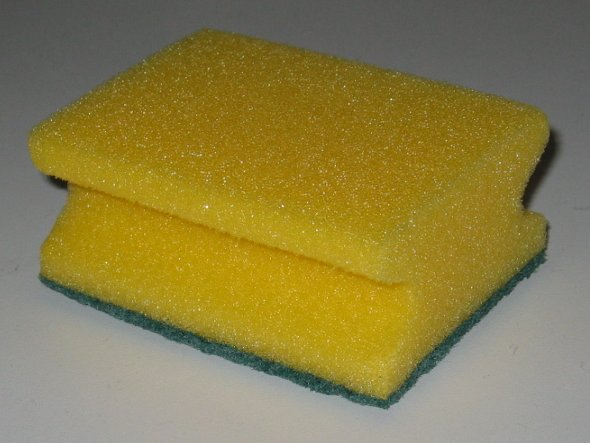 Topfschwamm